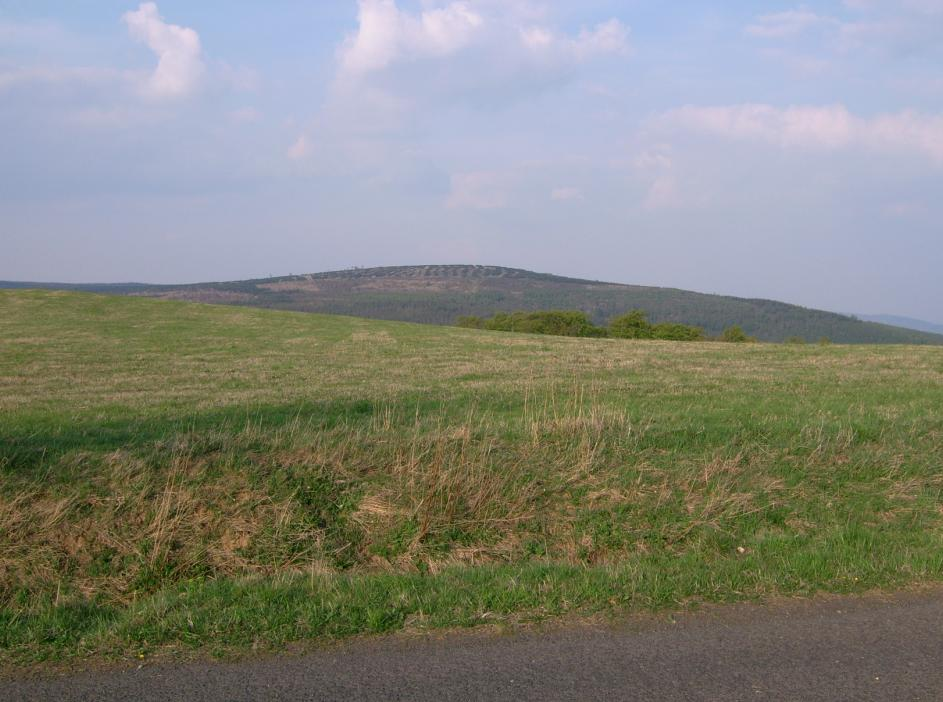 Pohled na Pramenáč od Bouřňáku